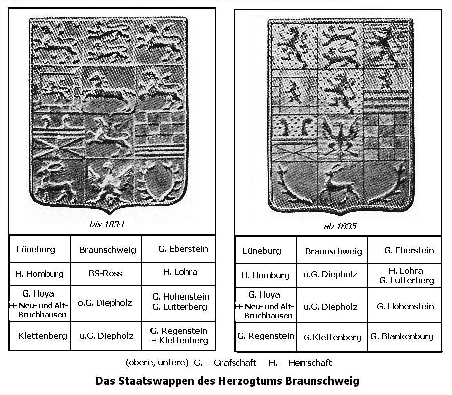 Braunschweiger Wappen auf Münzen